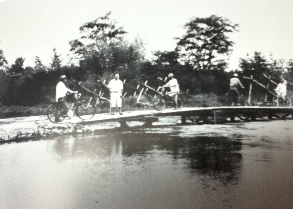 木造橋だった頃の小網橋